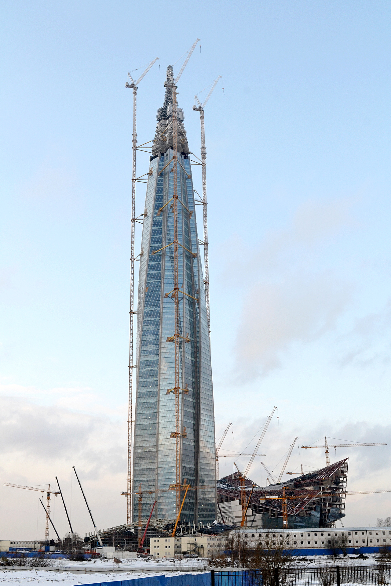 Lakhta Center